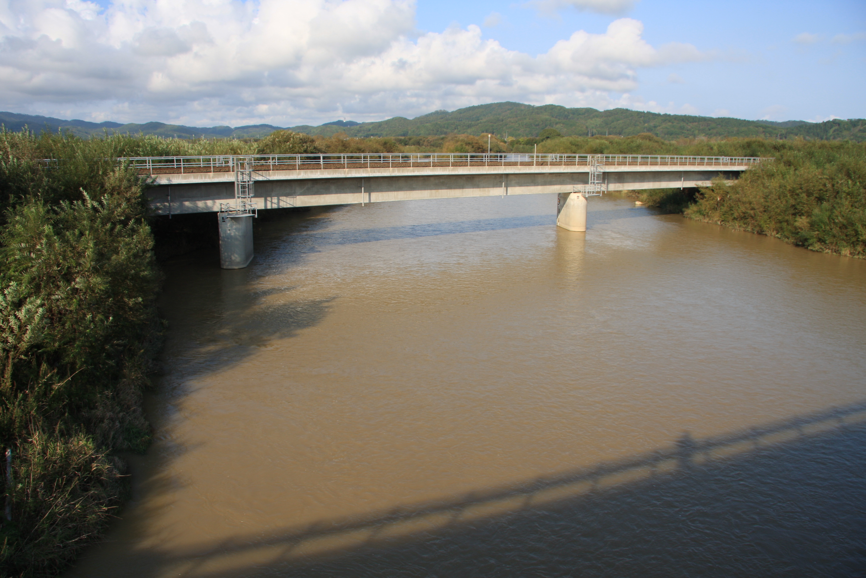 茶路川 白糠橋上流